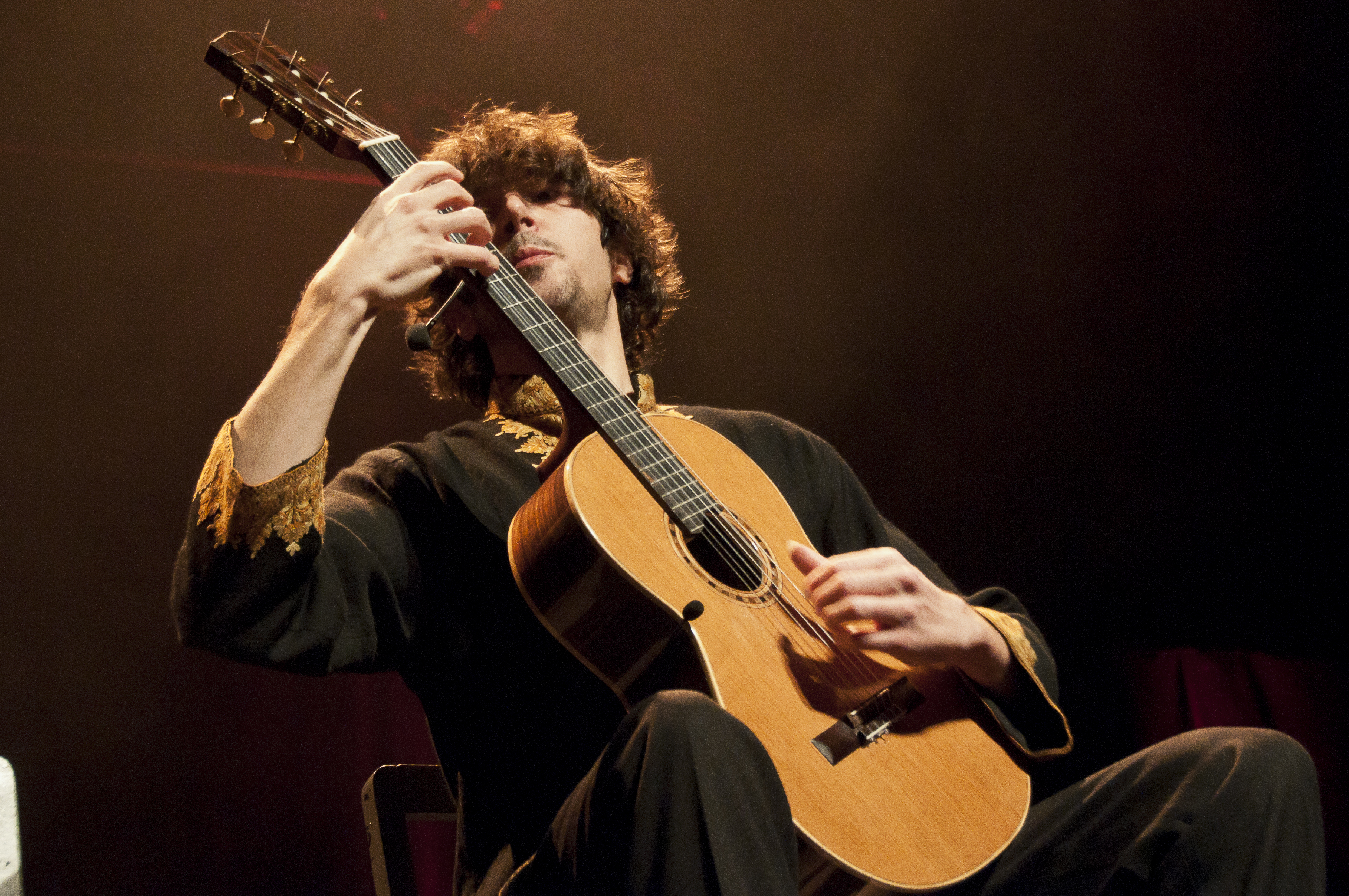 Olivier Pelmoine 2